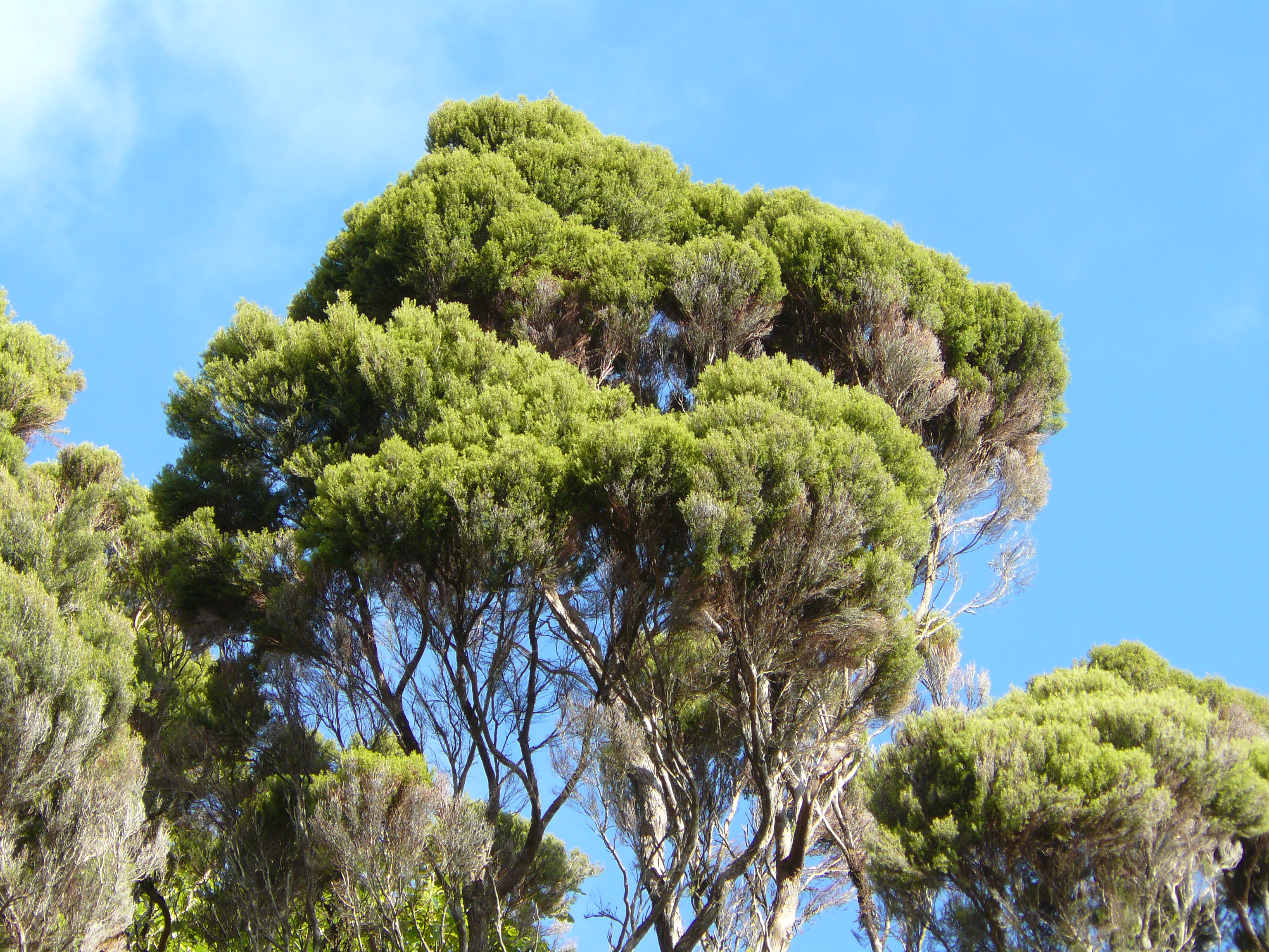 Ursprüngliche endemische Erica Azorica auf der Insel São Miguel, Azoren.